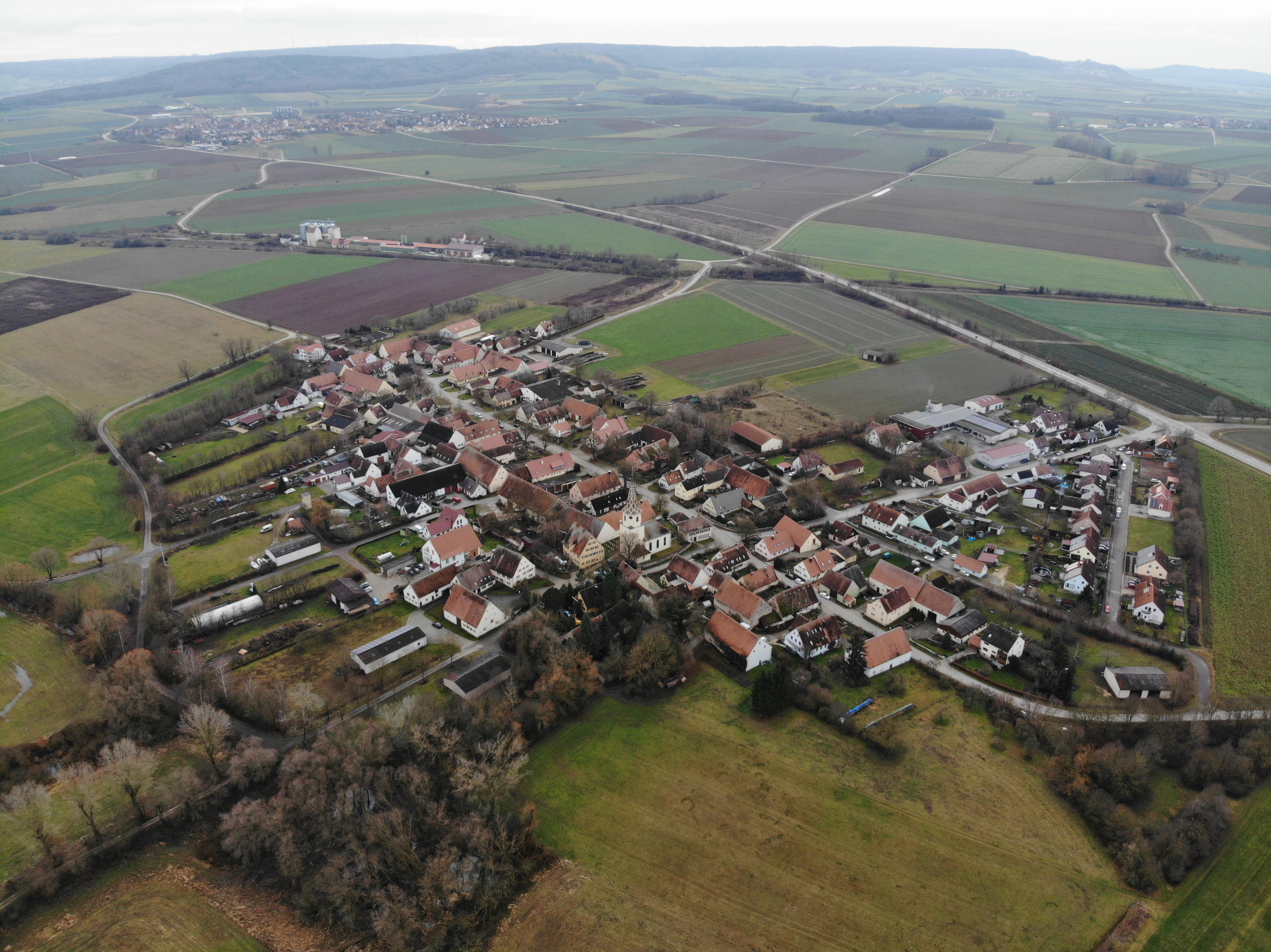 Windsfeld Luftaufnahme (2019)